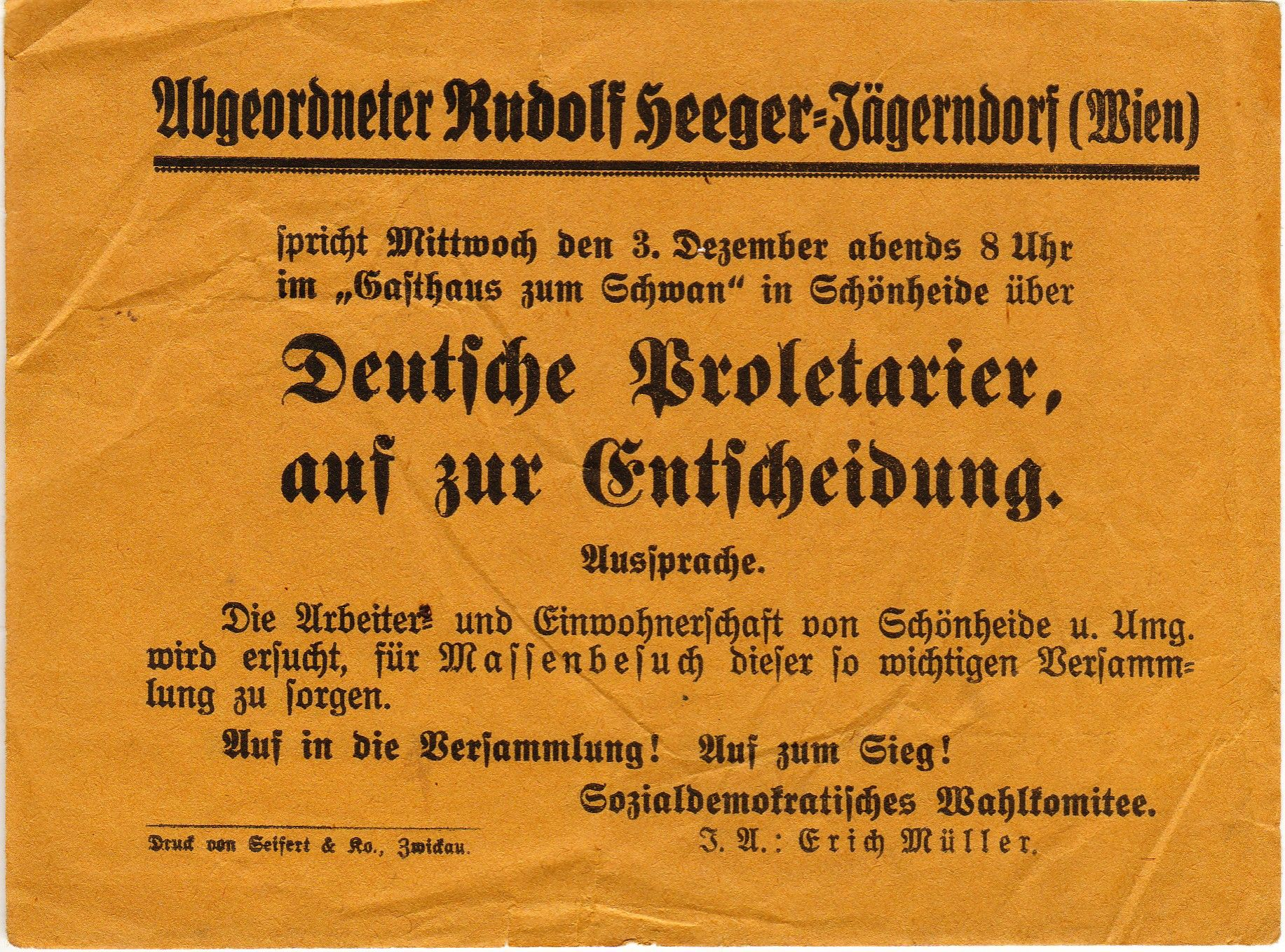 Rudolf Heeger, Šternberk, Německá sociálně demokratická strana dělnická v ČSR